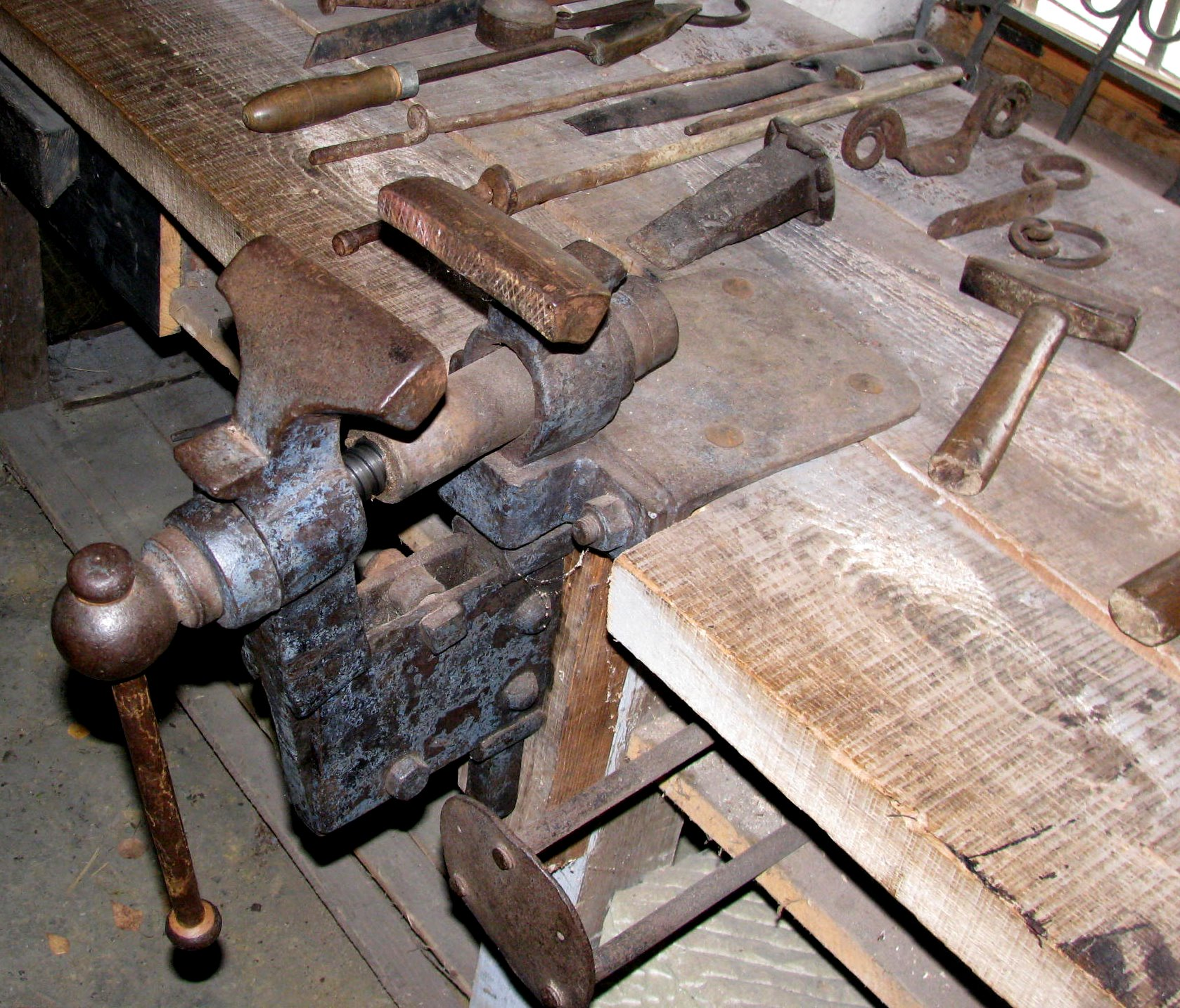 Open air museum, Rogatec, Slovenia